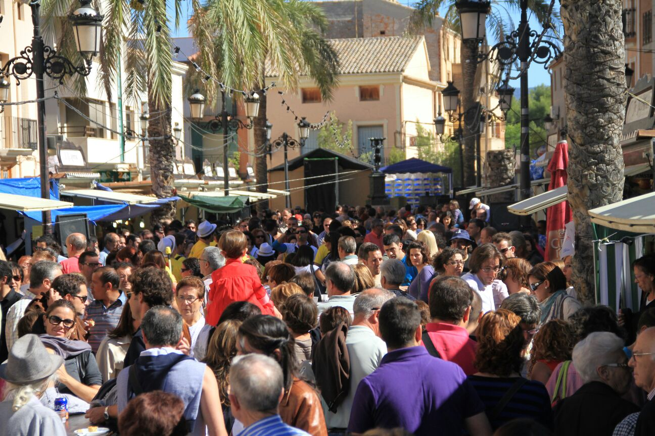 Zona de degustación y colmena de demostración del Corte de la Miel